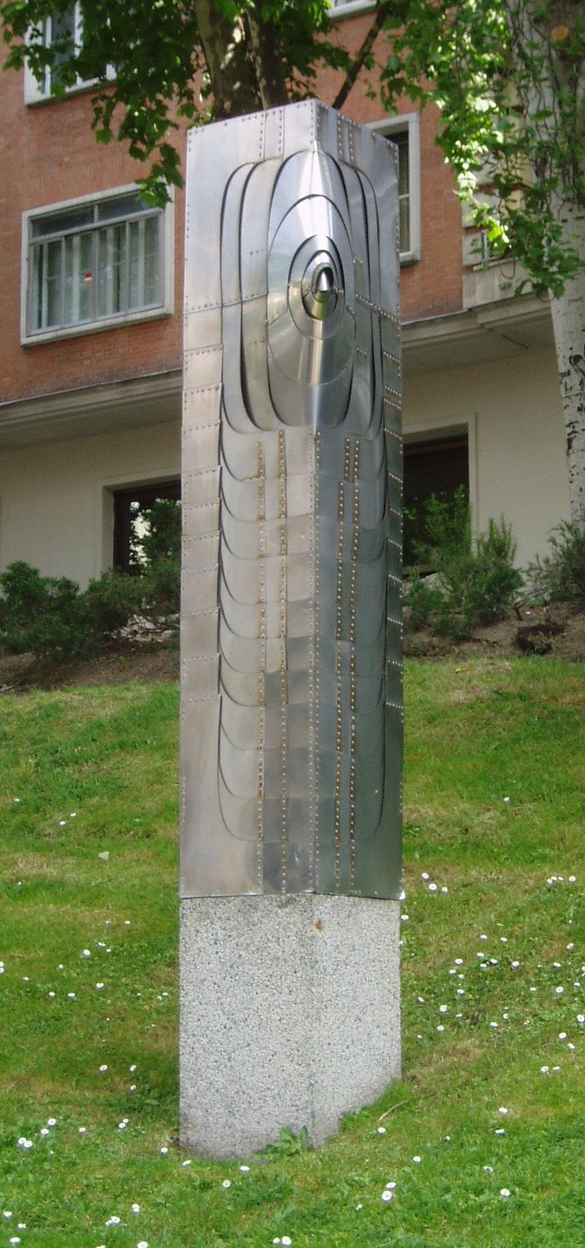 Estela de Venus, Amadeo Gabino. Madrid. España